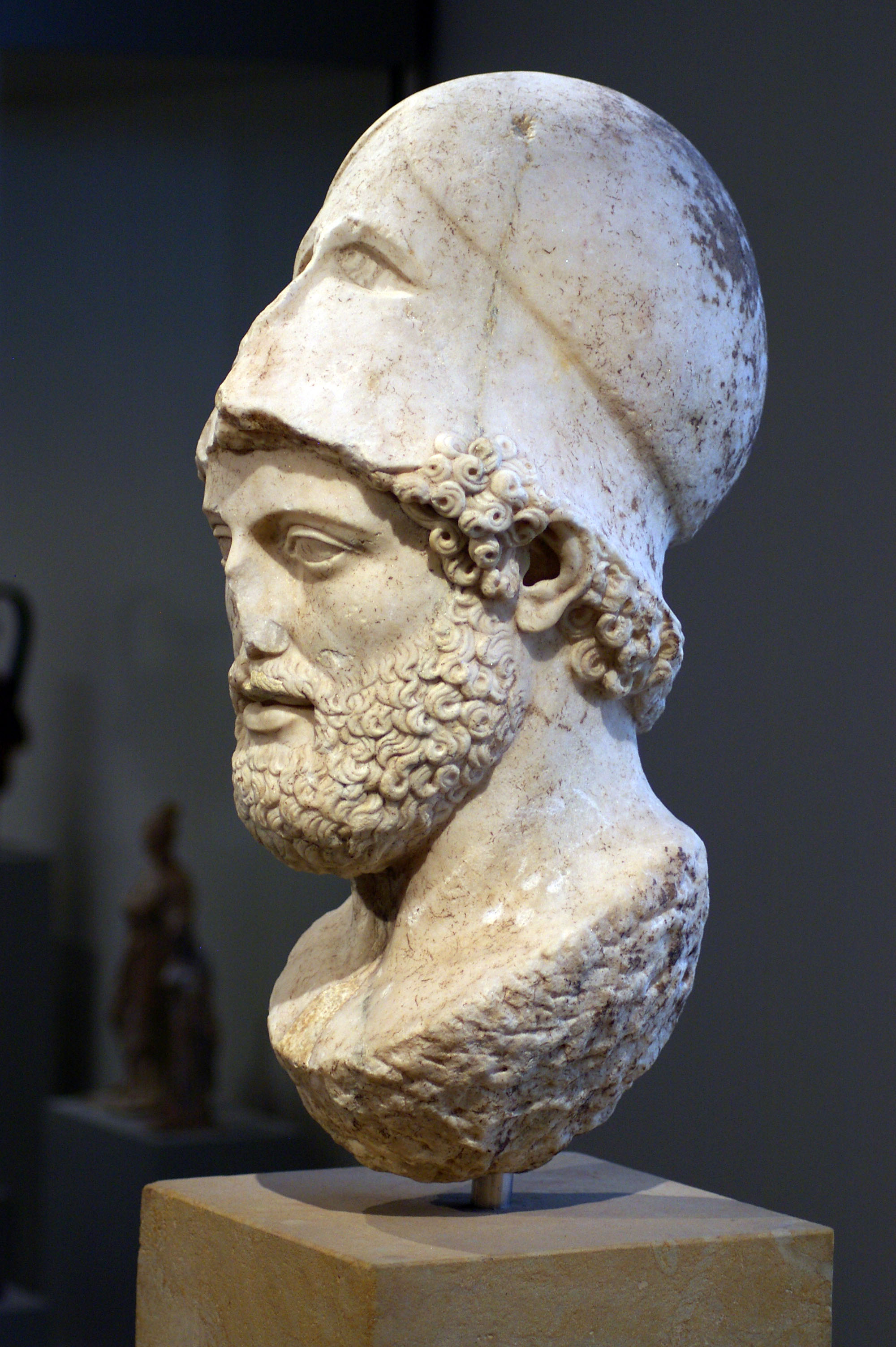 Busta Perikla v Altes Museu v Berlíně